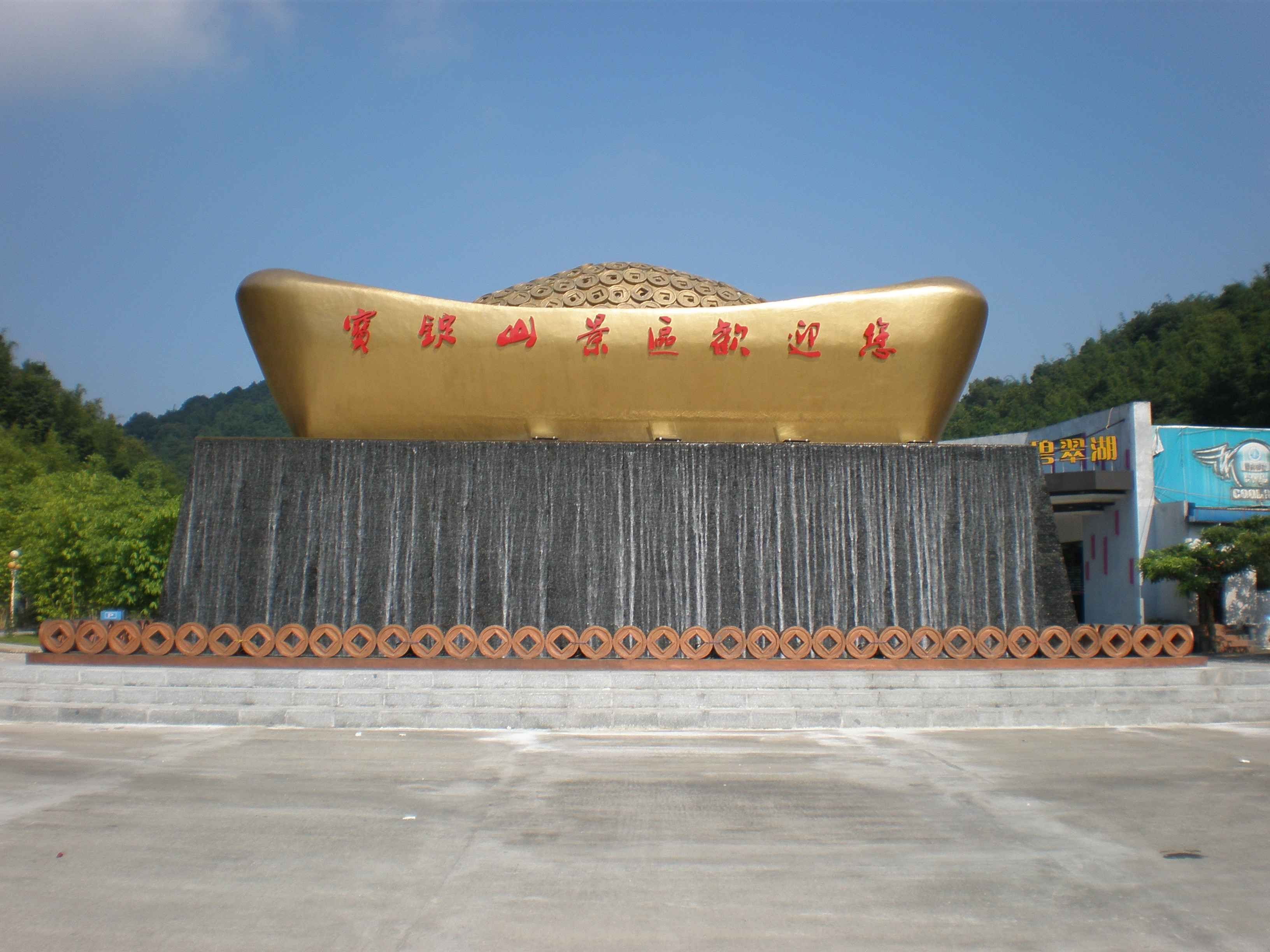 huaiji